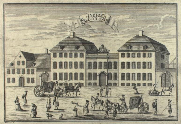 Kobberstik: Det Harboeske Enkefruekloster inden Thurahs ombygning. Trykt i Pontoppidans Danske Atlas, København 1764